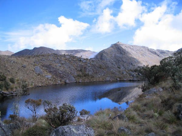 Laguna en La Cimarronera, Venezuela.